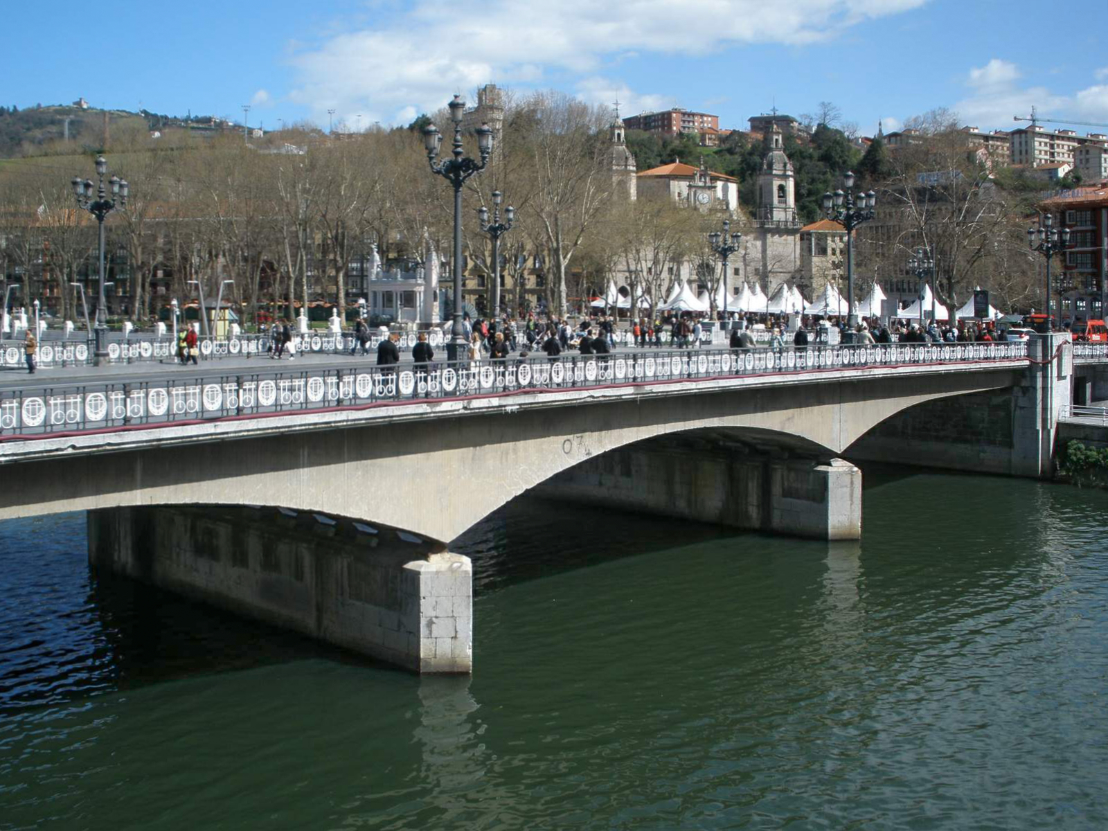 Puente del Arenal (Bilbao)